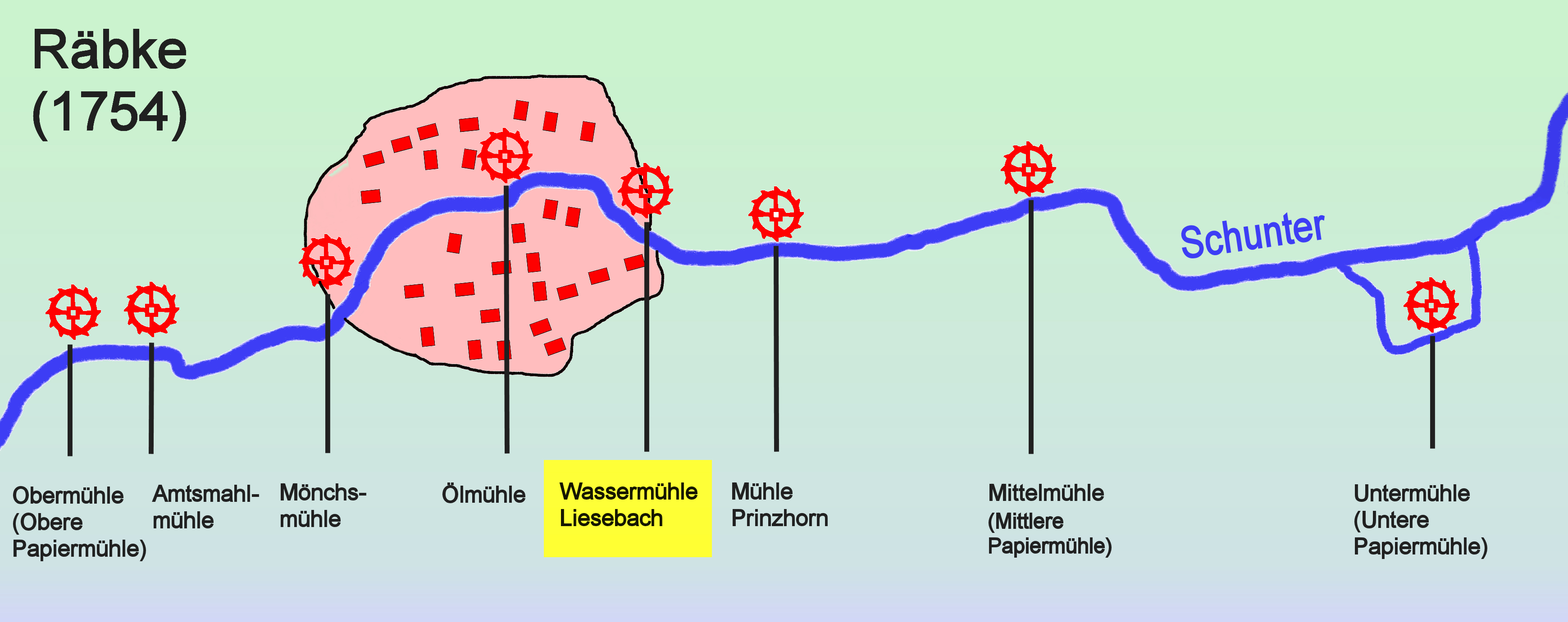 Wassermühle Liesebach am Mühlengraben bzw. der Schunter in Räbke, Zeichnung nach der Braunschweigischen General-Landesvermessung von 1754